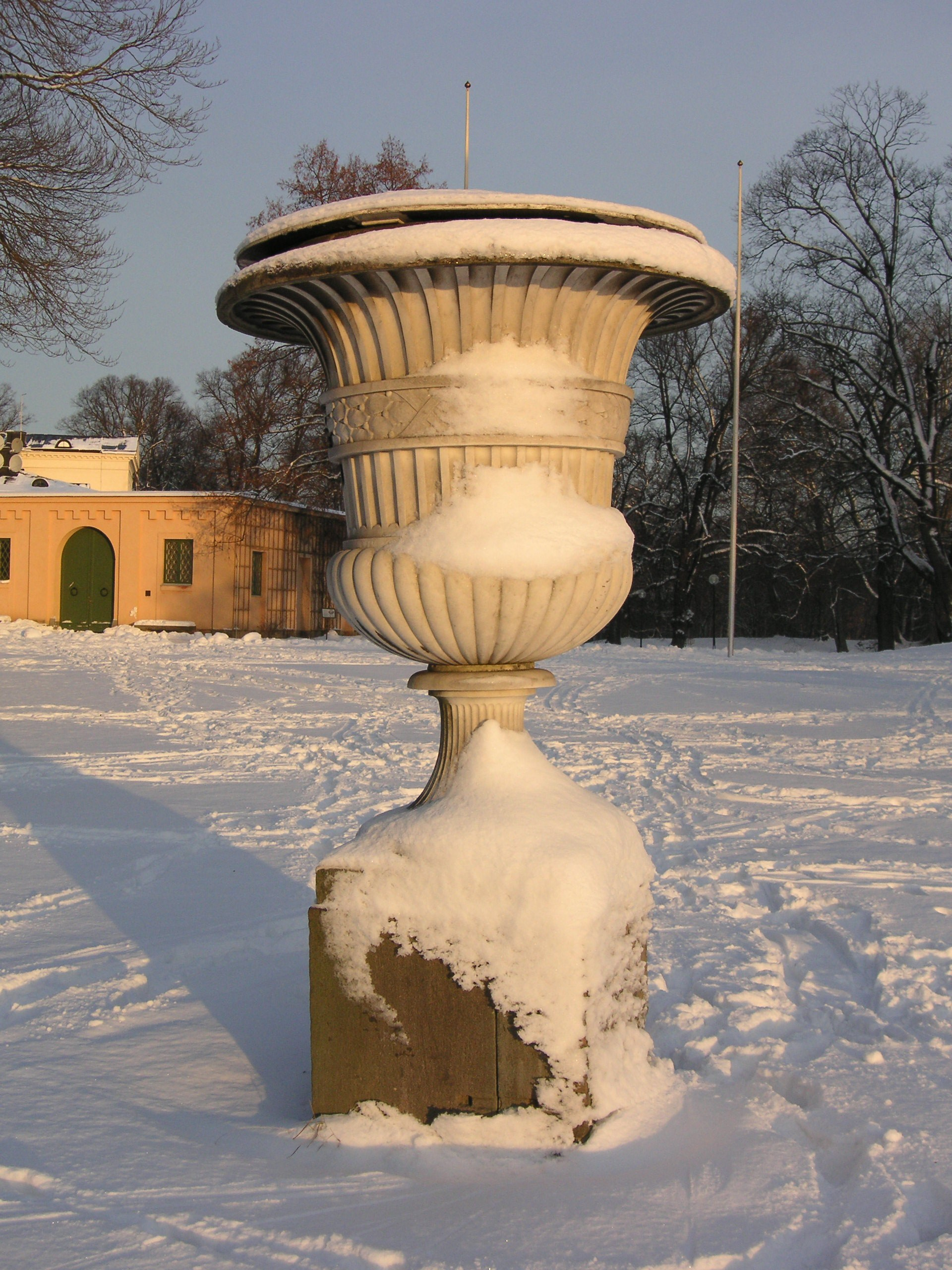 En av Hagaparkens två marmorurnor